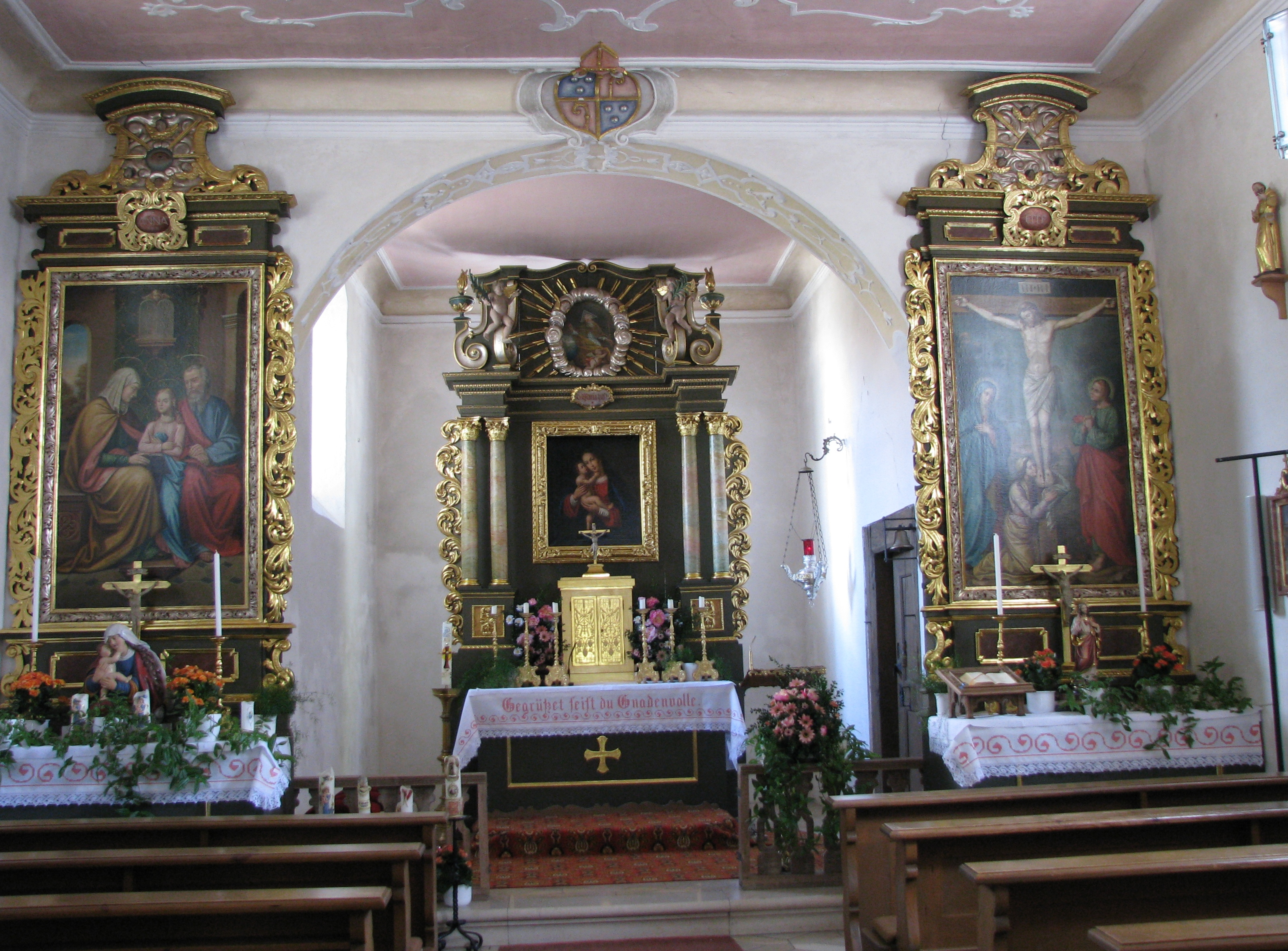 Linden, Ortsteil von Greding im mittelfränkischen Landkreis Roth in Bayern, Barockausstattung der Mariahilf-Wallfahrtskirche